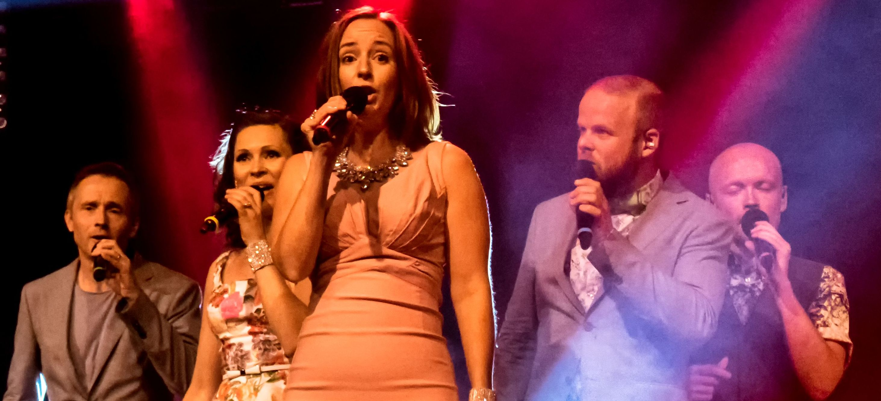 Bilder vom Zelt Musik Festival 2016 in Freiburg im Breisgau Die A capella Band "The real Group". Von links: Anders Edenroth, Lisa Östergren, Emma Nilsdotter, Morten Vinther und Jānis Strazdiņš